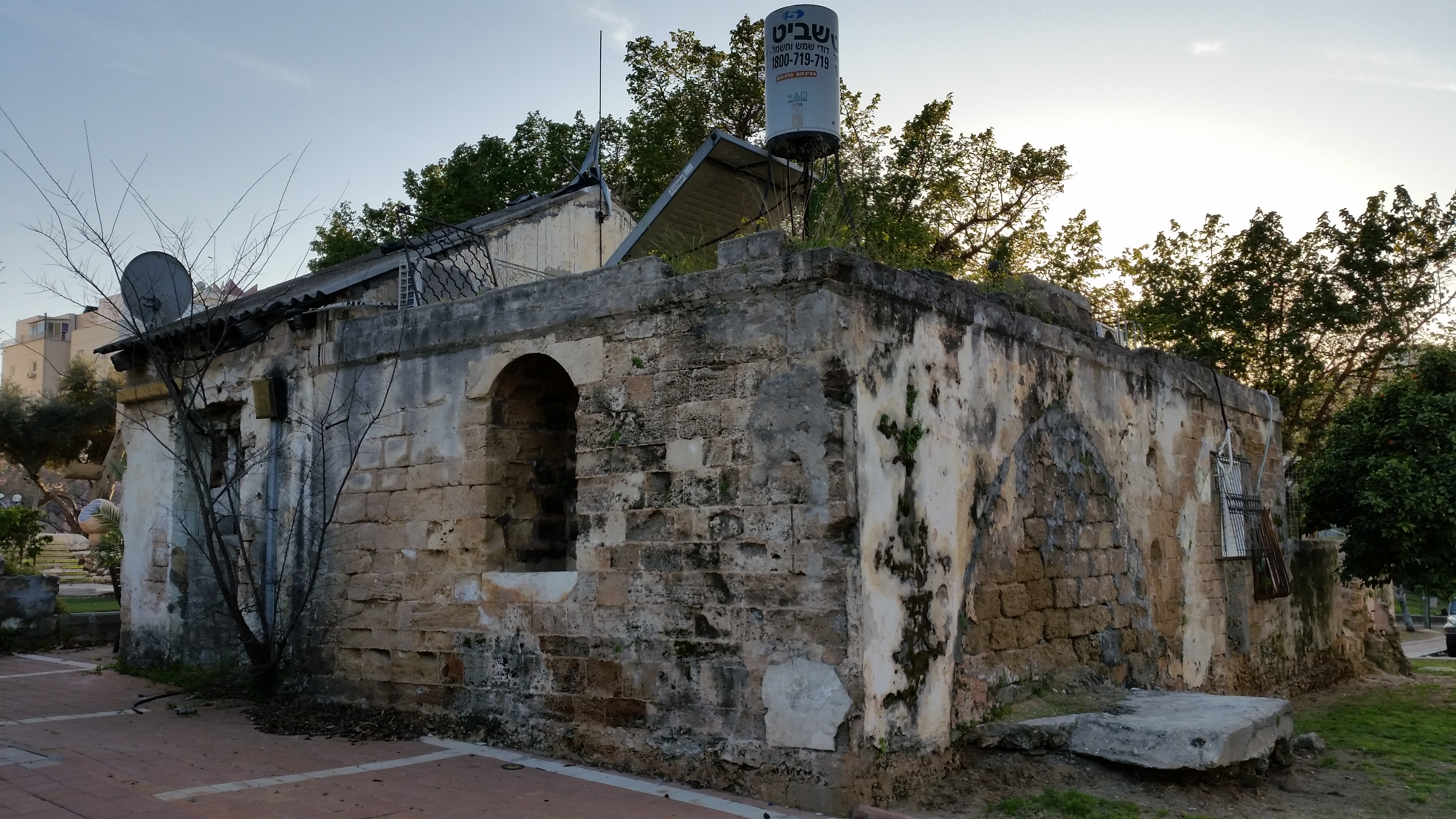 בית ישן של שכונת אבו כביר, צמוד למרכז הקהילתי נוה עופר